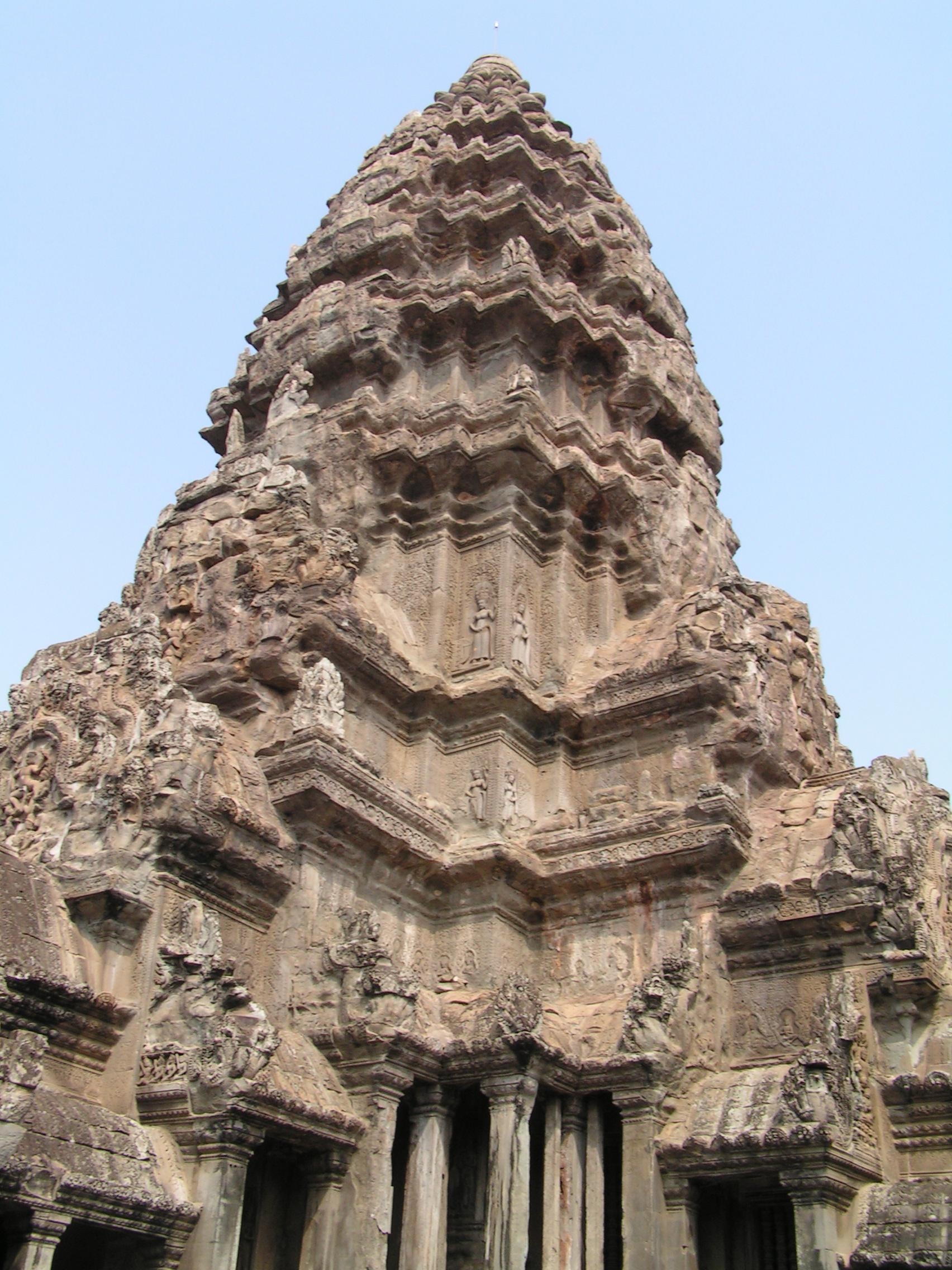 Tower-Angkor_Wat